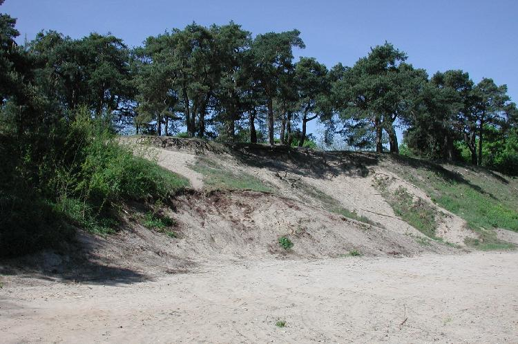 Das heutige Naturschutzgebiet "Sandhausener Dünen" im Rhein-Neckar-Kreis, ist nur noch ein kleiner Rest einer einst großflächigen Dünenlandschaft der Nördlichen Oberrheinebene.